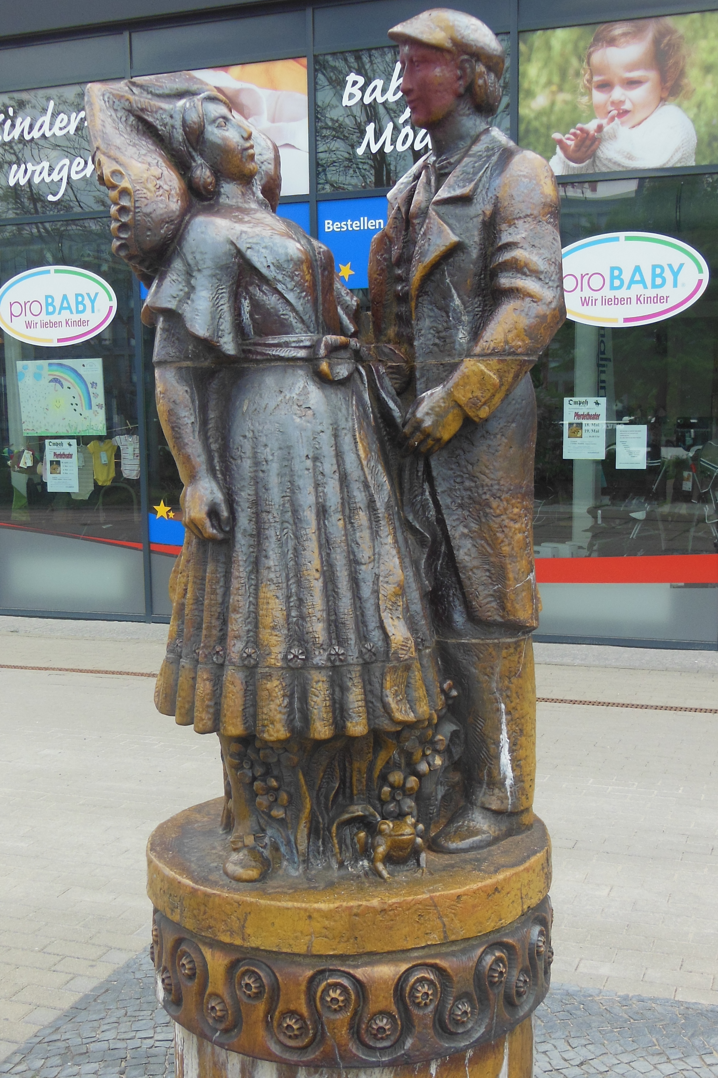 Plastik Sorbisches Paar des Künstlers Egmar Ponndorf am Cottbuser Stadtring